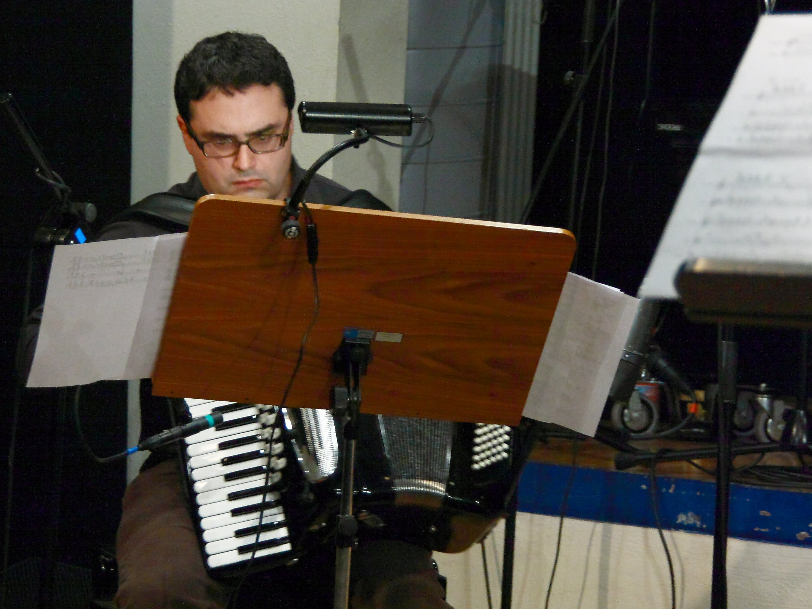 Ted Reichmann mit dem Ingrid Laubrock Octet im Kult, Niederstetten.